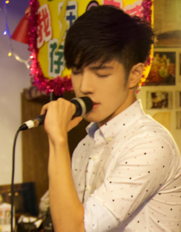 童立安 攝於2015年8月9日 童樂會－小安夏日巡演